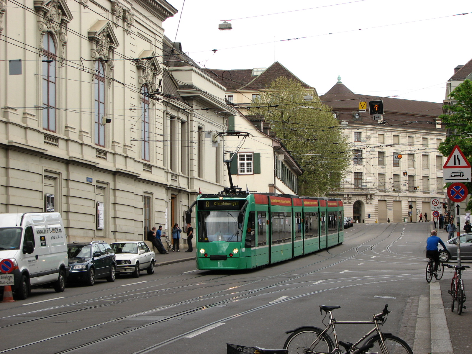 Tramvaj v Basileji